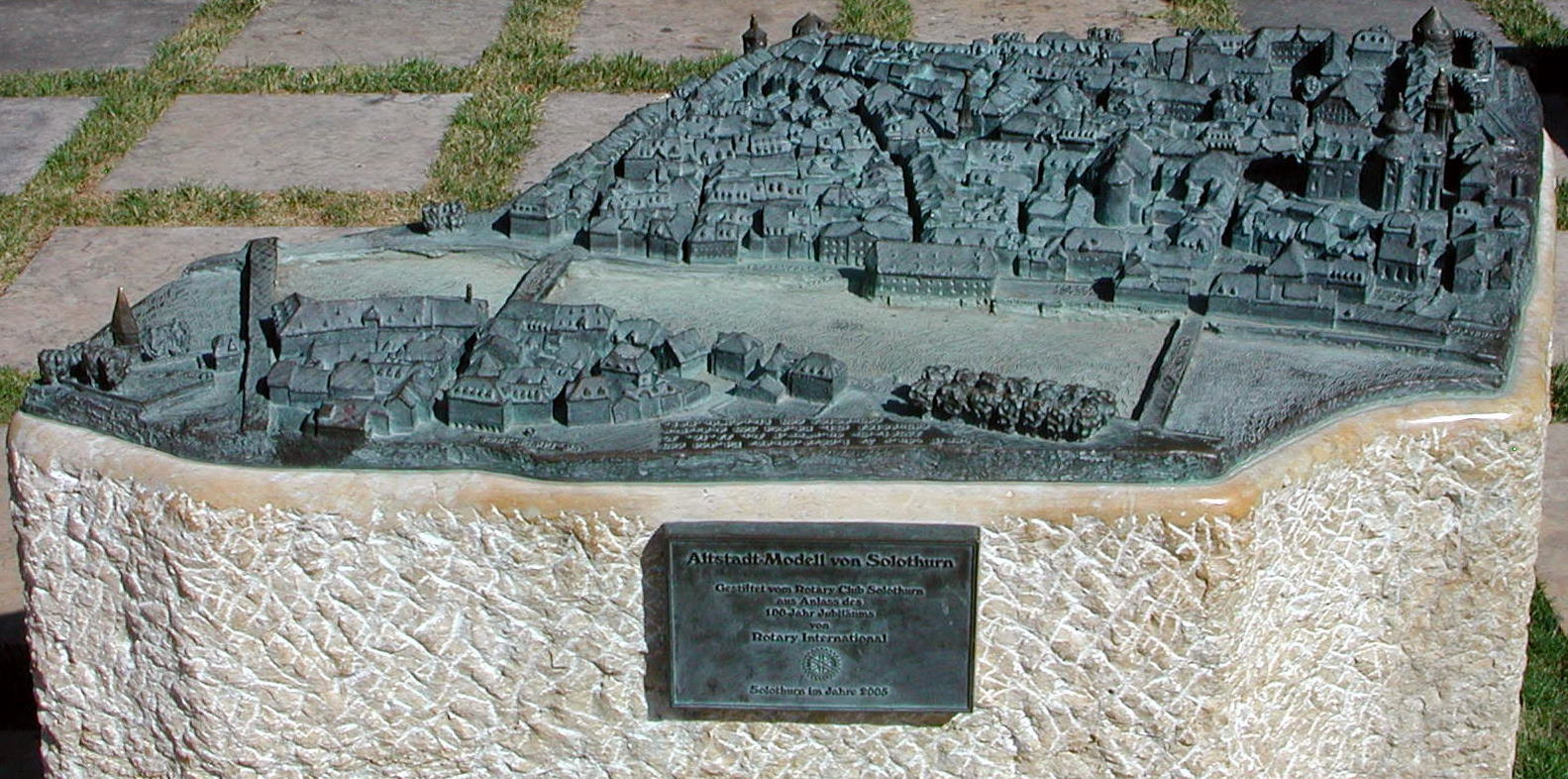 Ein Modell der Solothurner Altstadt vor dem Baslertor in Solothurn.